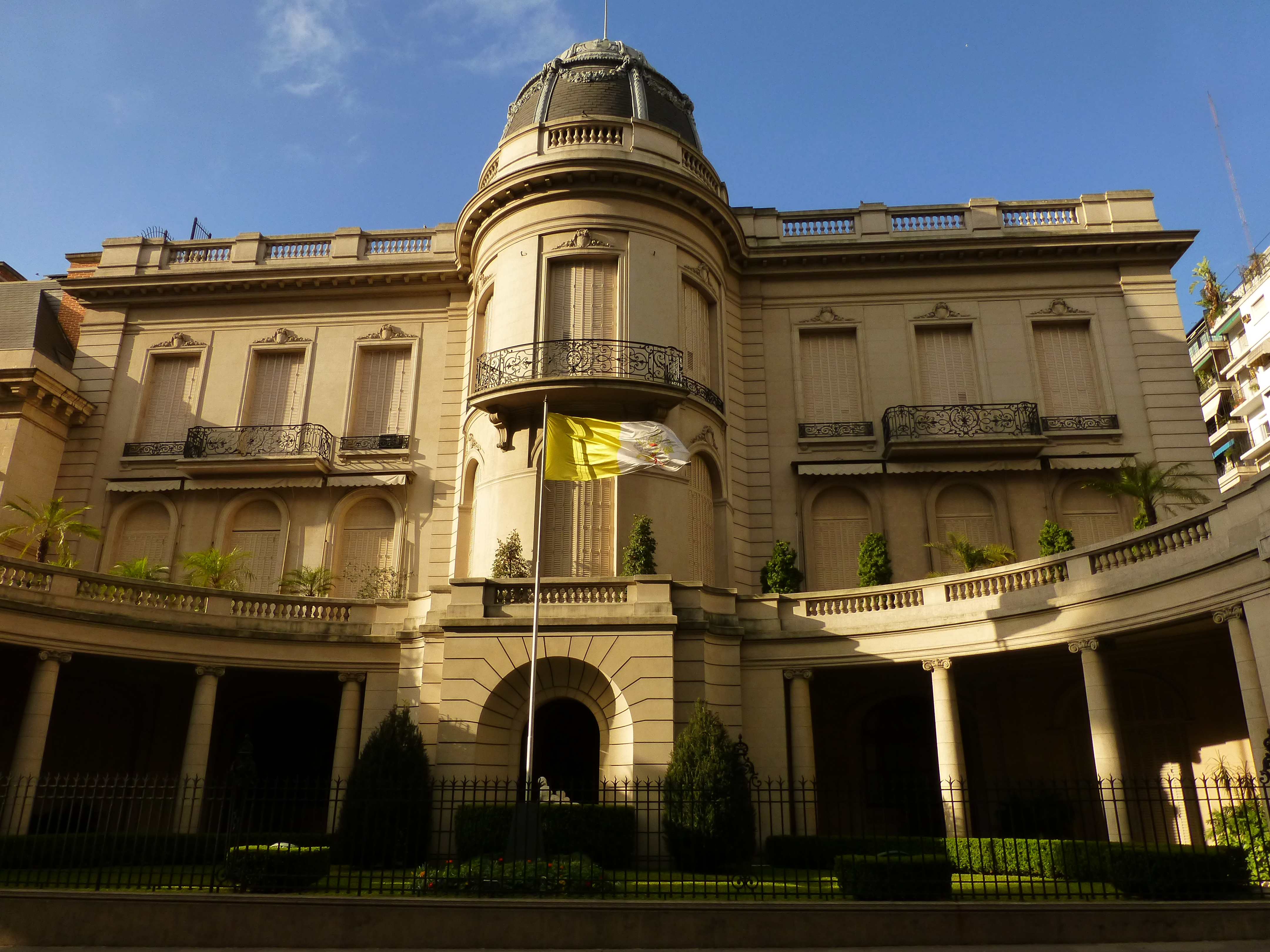 Nunciatura Apostólica